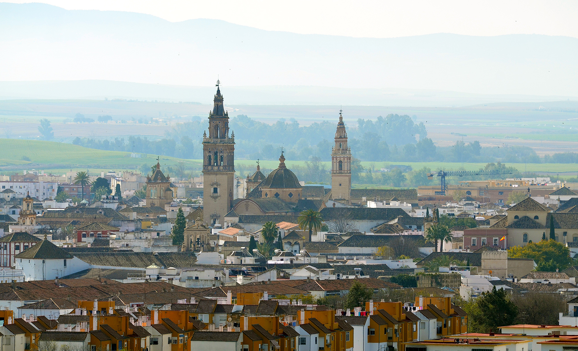 Parroquia de Santa María